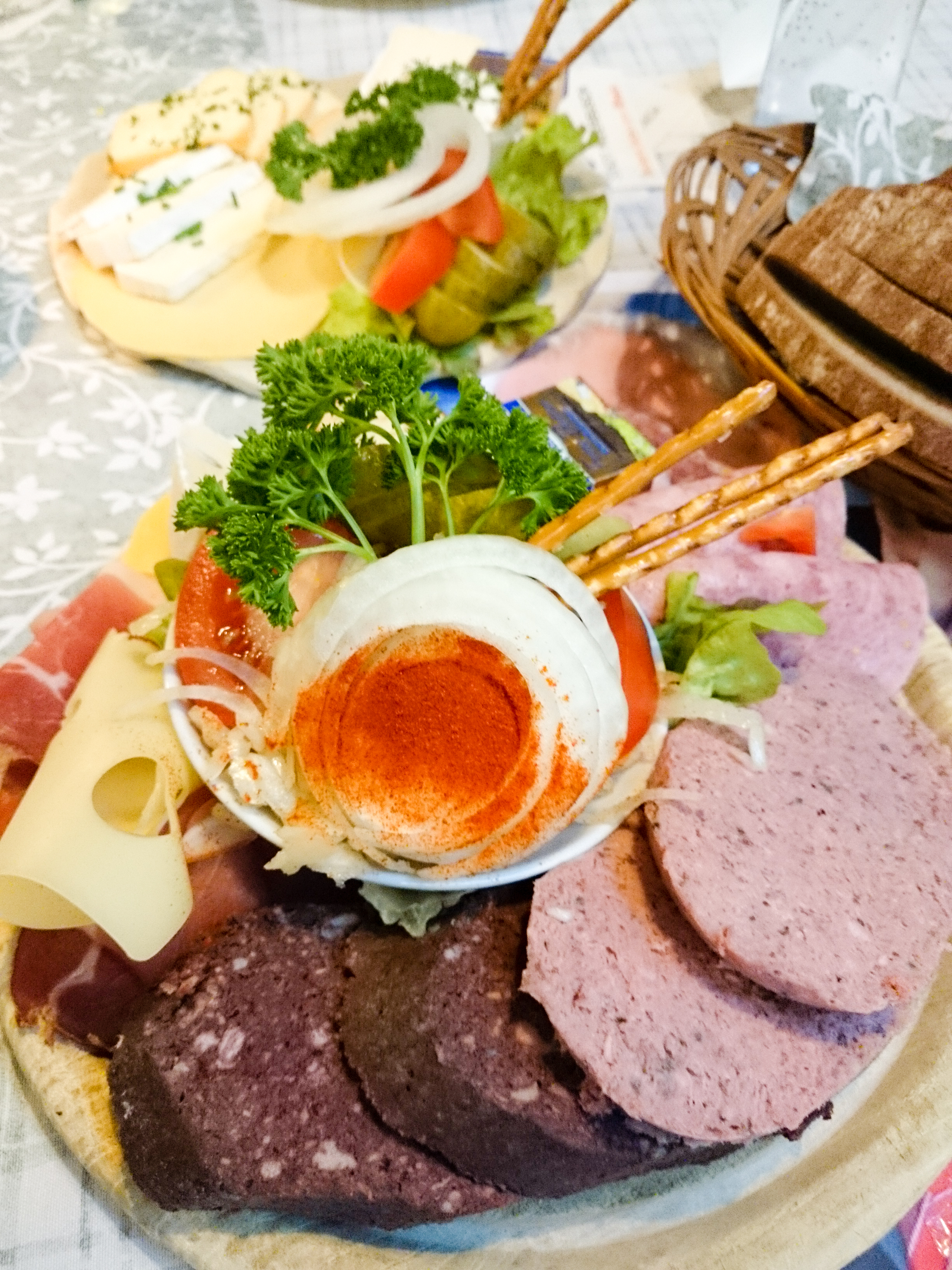 Winzerplatte mit Leberwurst, Blutwurst, Schinken, Käse